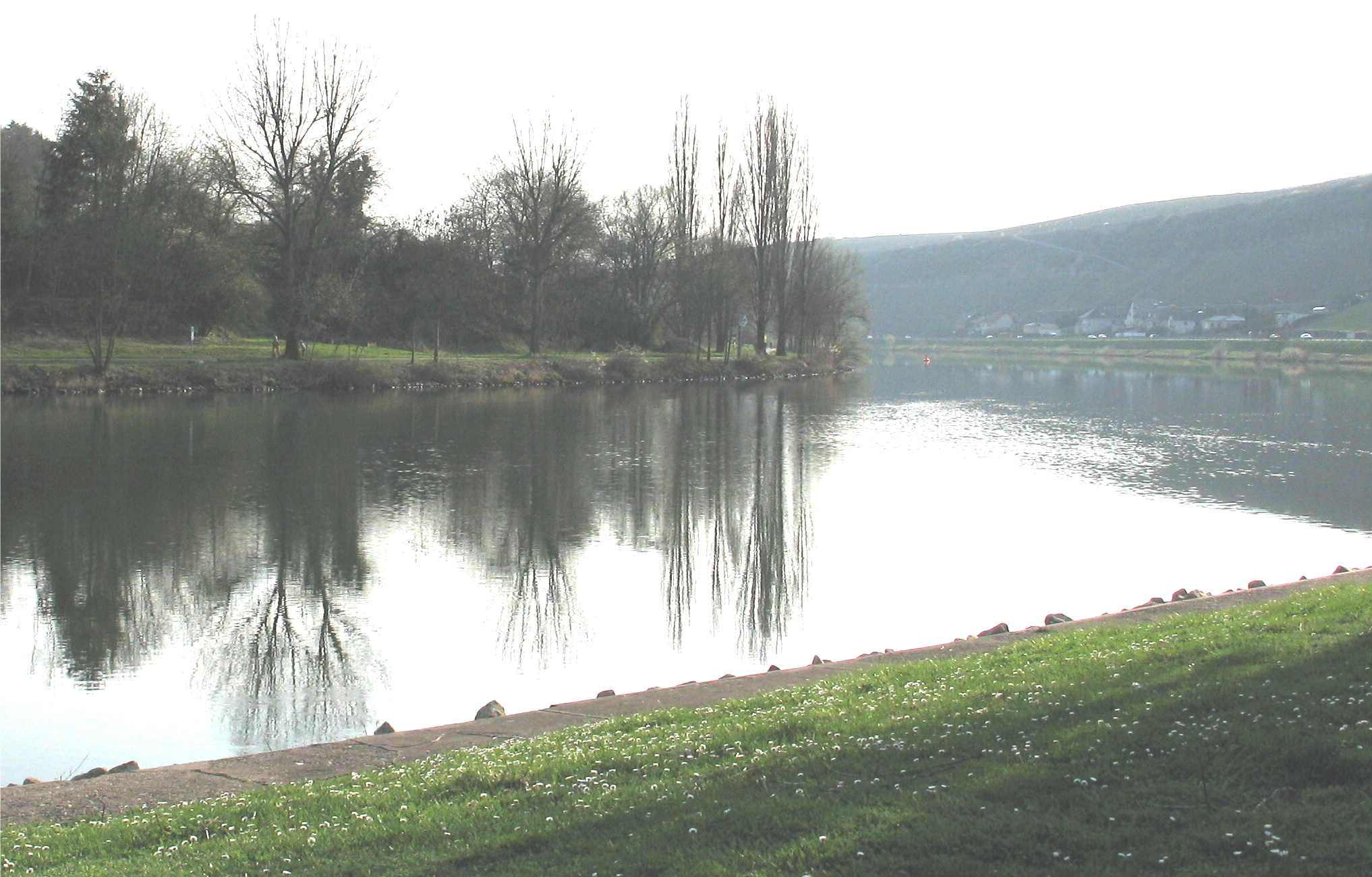 D'Musel bei Éinen